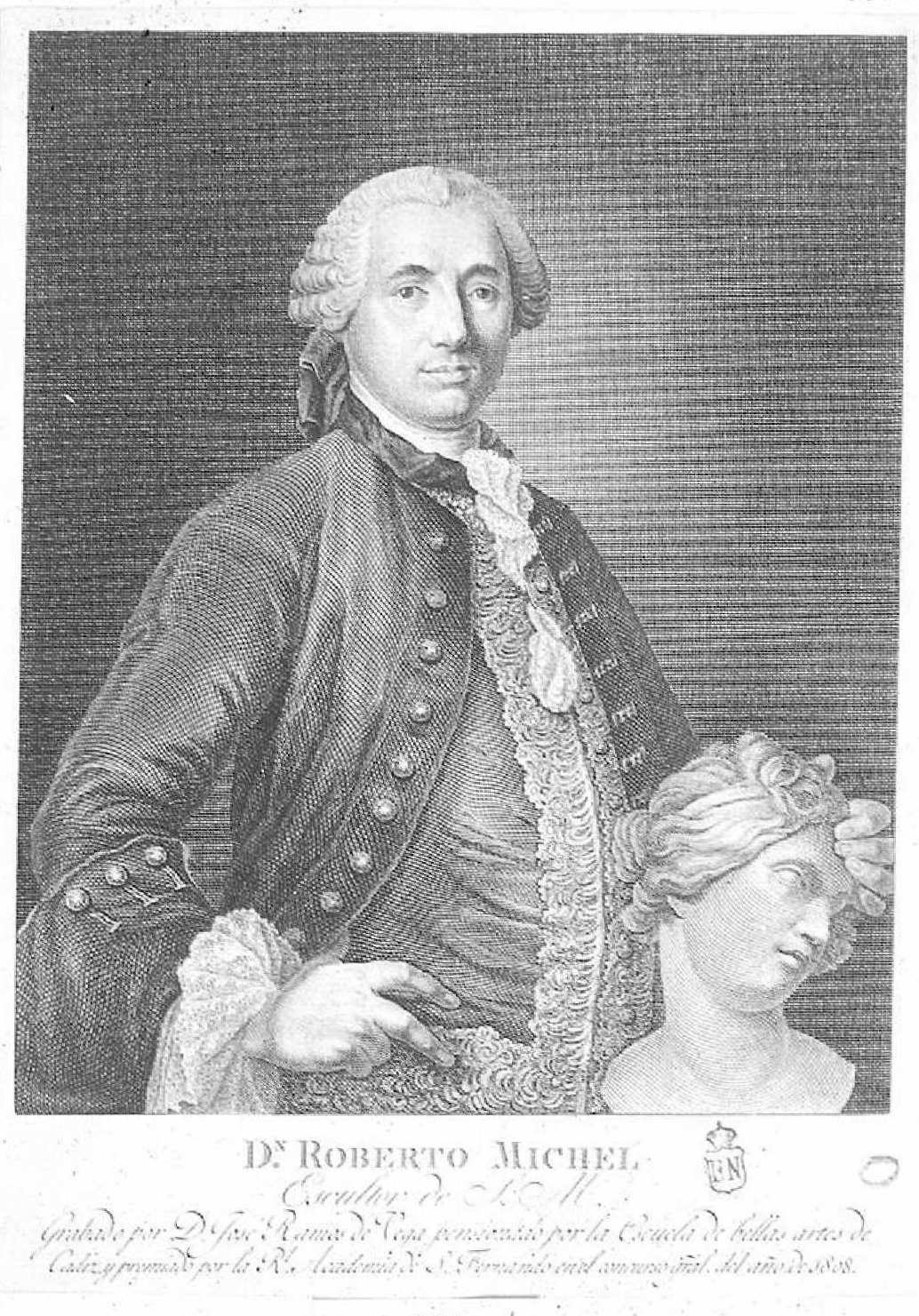 Retrato de Roberto Michel por José María Ramos y de la Vega. Buril. Inscripción: Dn. Roberto Michel Escultor de S. M. Grabado por D. José Ramos de Vega pensionado por la Escuela de bellas artes de Cádiz y premiado por la R.l Academia de S. Fernando en el concurso gral. del año 1808. Biblioteca Nacional de España